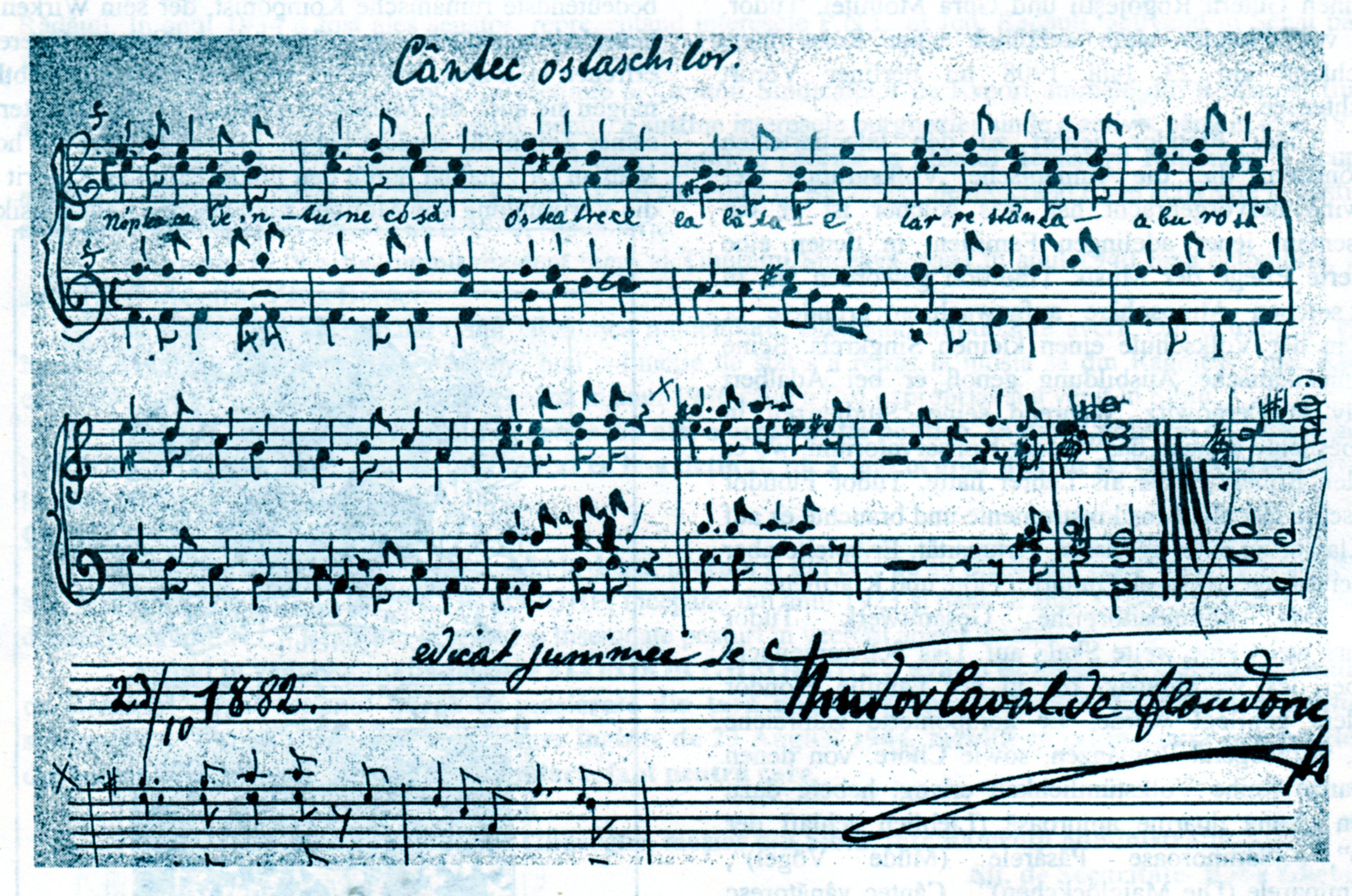 Cântecul ostaşilor (Lied der Soldaten), Original von Theodor Ritter von Flondor 1882